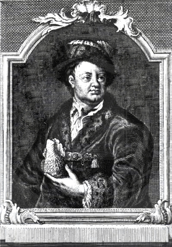 Porträt des deutschen Botanikers Johann Georg Gmelin (1709–1755)